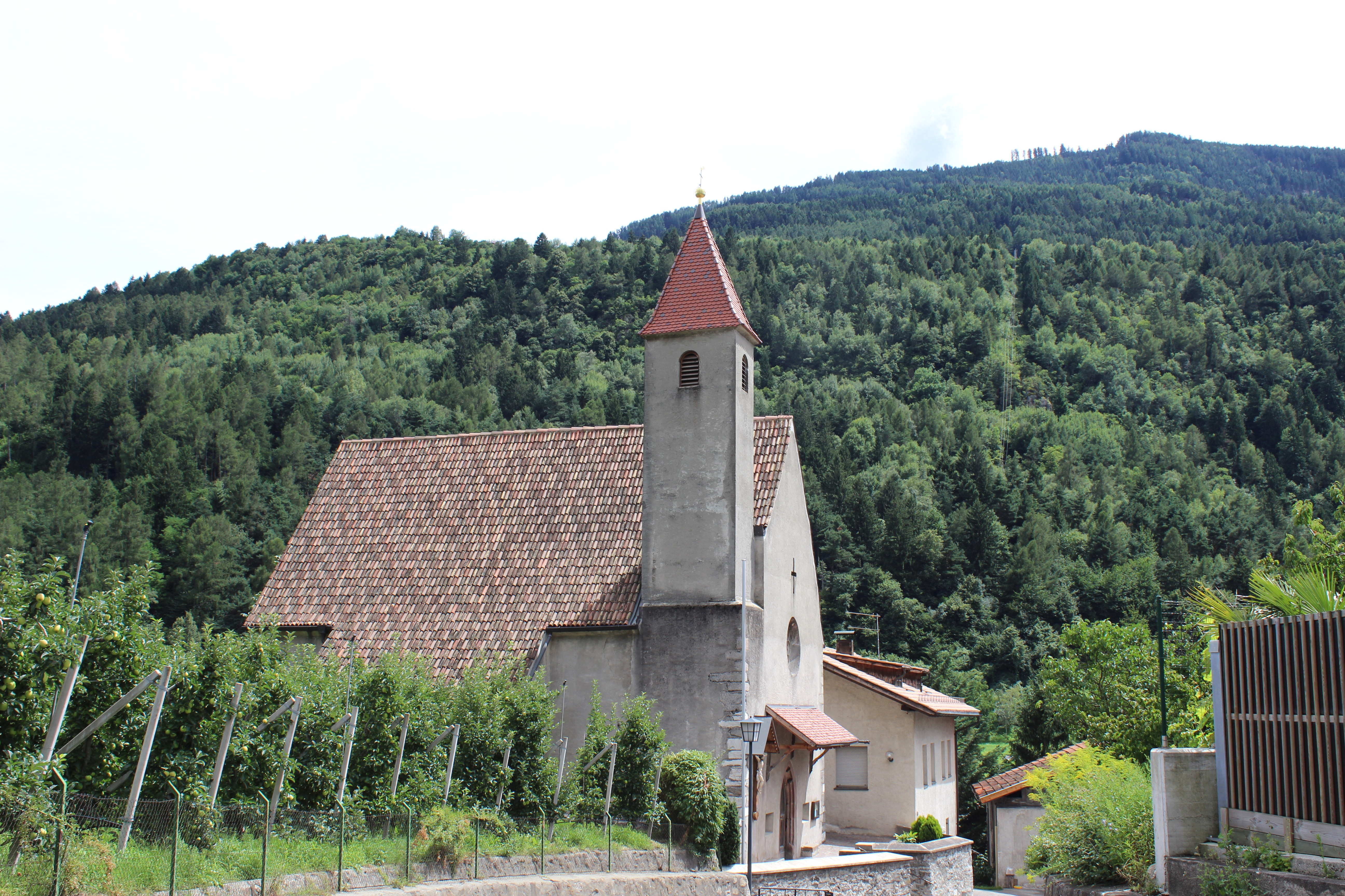 St. Helena auf der Töll